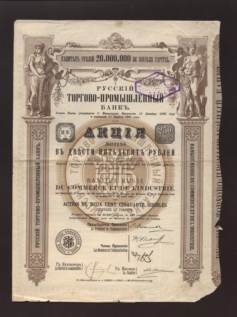 Акция в 250 руб. на предъявителя Русского торгово-промышленного банка. С.-Петербург, 1910 г.